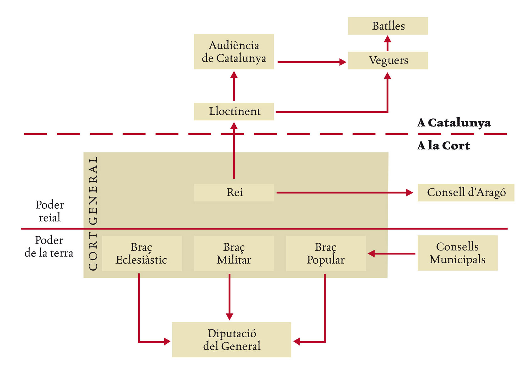 Esquema de la organització política de la Catalunya d'època moderna (s. XVI i XVII). Les institucions reials, a dalt, presents a Madrid i a Catalunya. Les institucions de la terra que neixen de les Corts catalanes, a baix.